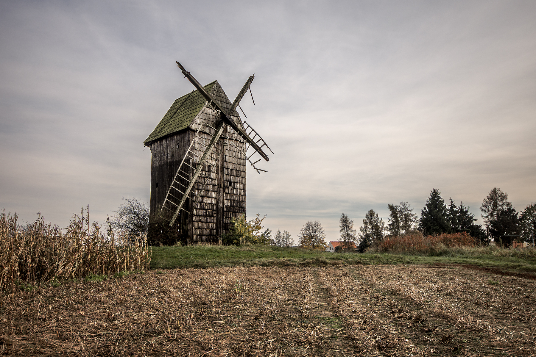 Krzywiń, wiatrak koźlak, 1698, XIX